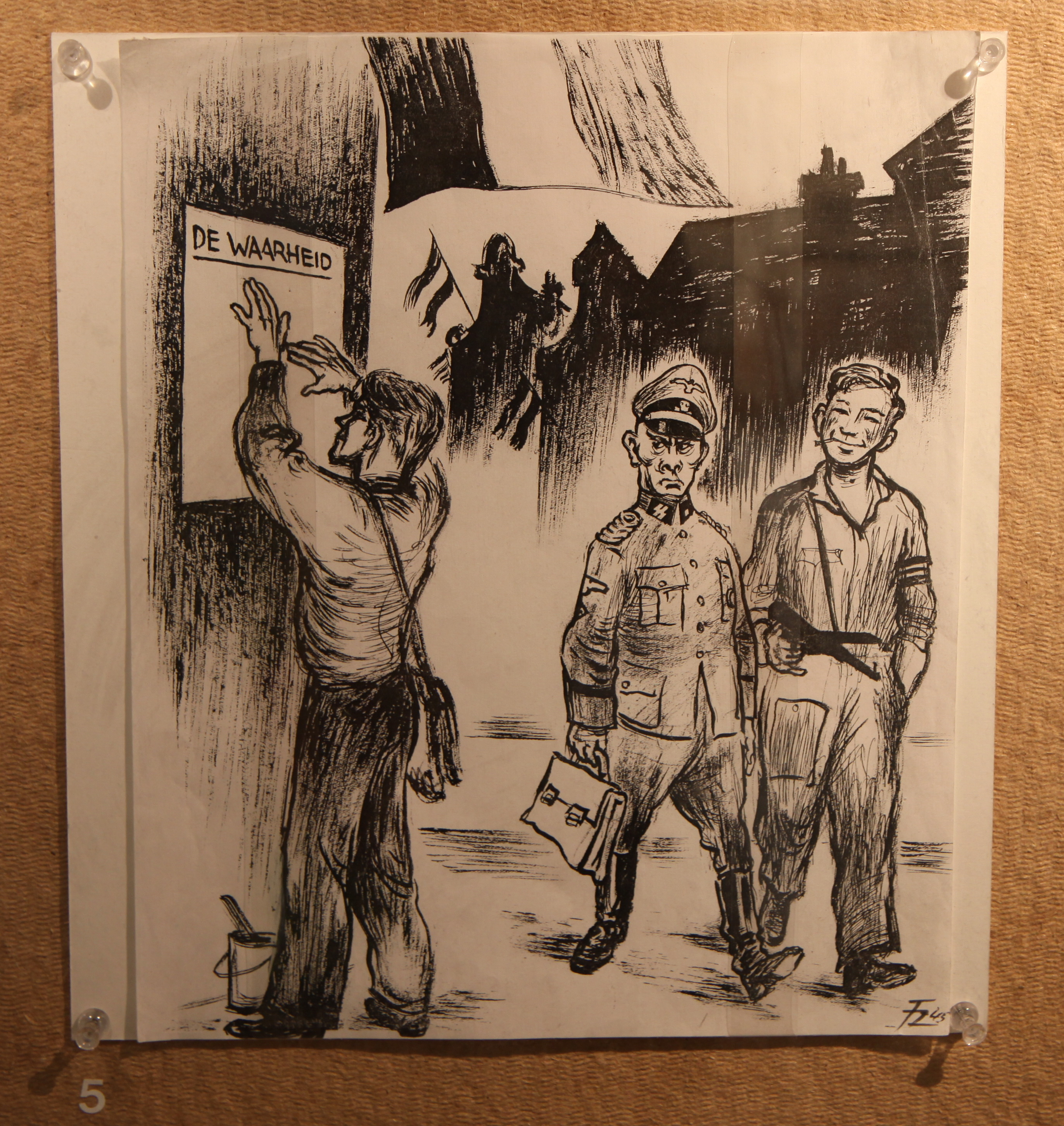 090626-123508_ 1826_50D